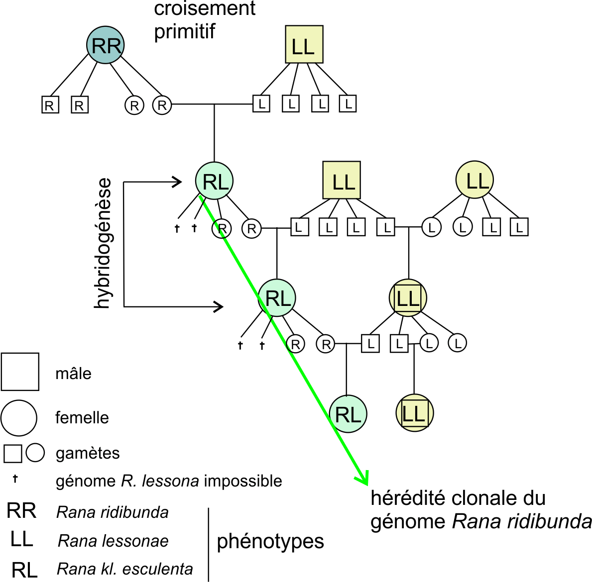 Reproduction de type hybridogénèse de Rana kl. esculenta avec croisement en retour continuel avec R. lessonae d'après Tunner HG (1974), Die klonale Struktur einer Wasserfroschpopulation, Z. zool. Syst. Evol. Forsch. 12